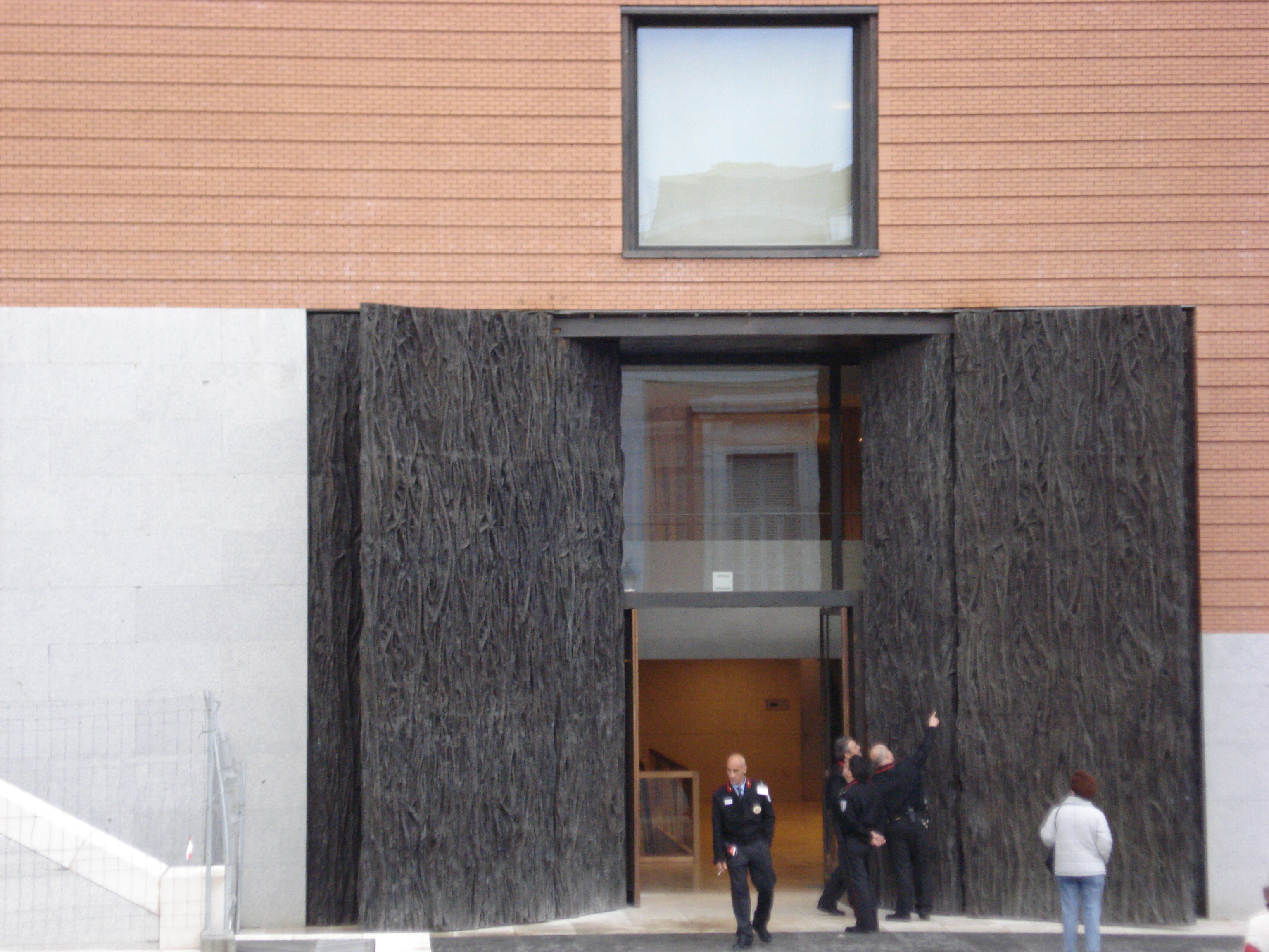 Las puertas de Cristina Iglesias parecen tejas de chocolate